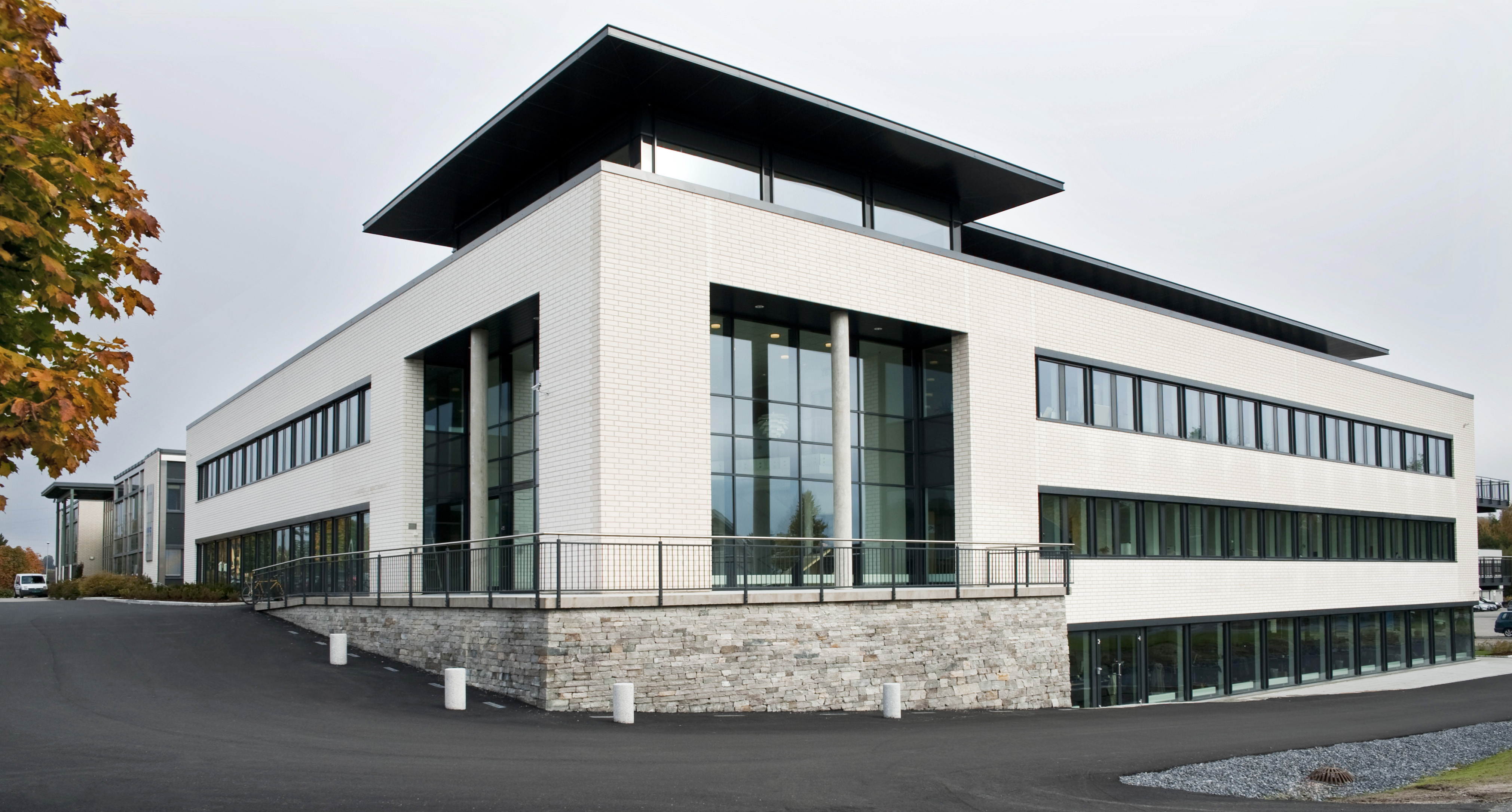 Kontorbygget til Pasientreiser HF holder til Grenland Næringspark